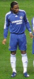 Didier Drogba.